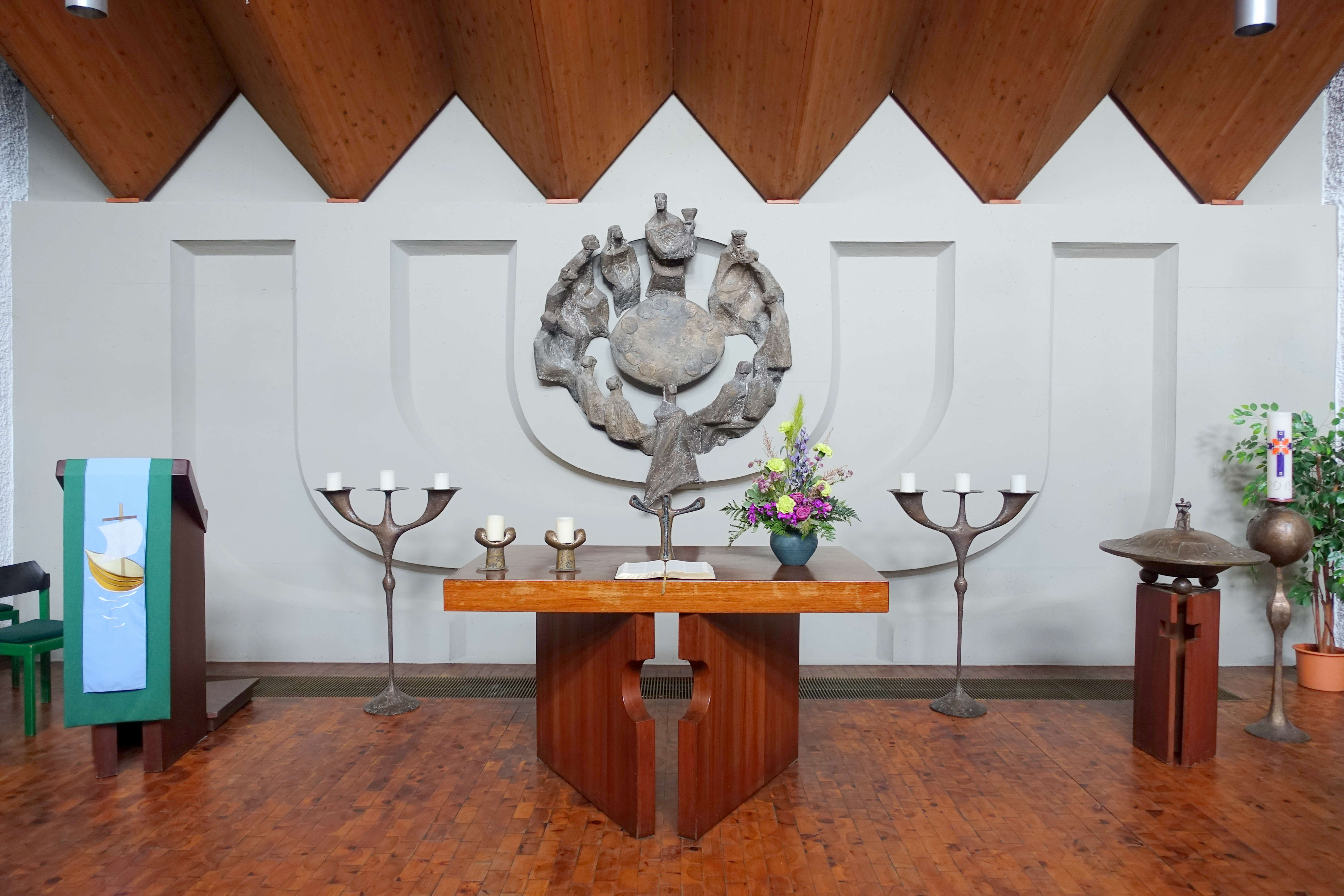 Ökumenisches Kirchenzentrum Parkstadt Solln (München) Kirchenraum Petruskirche